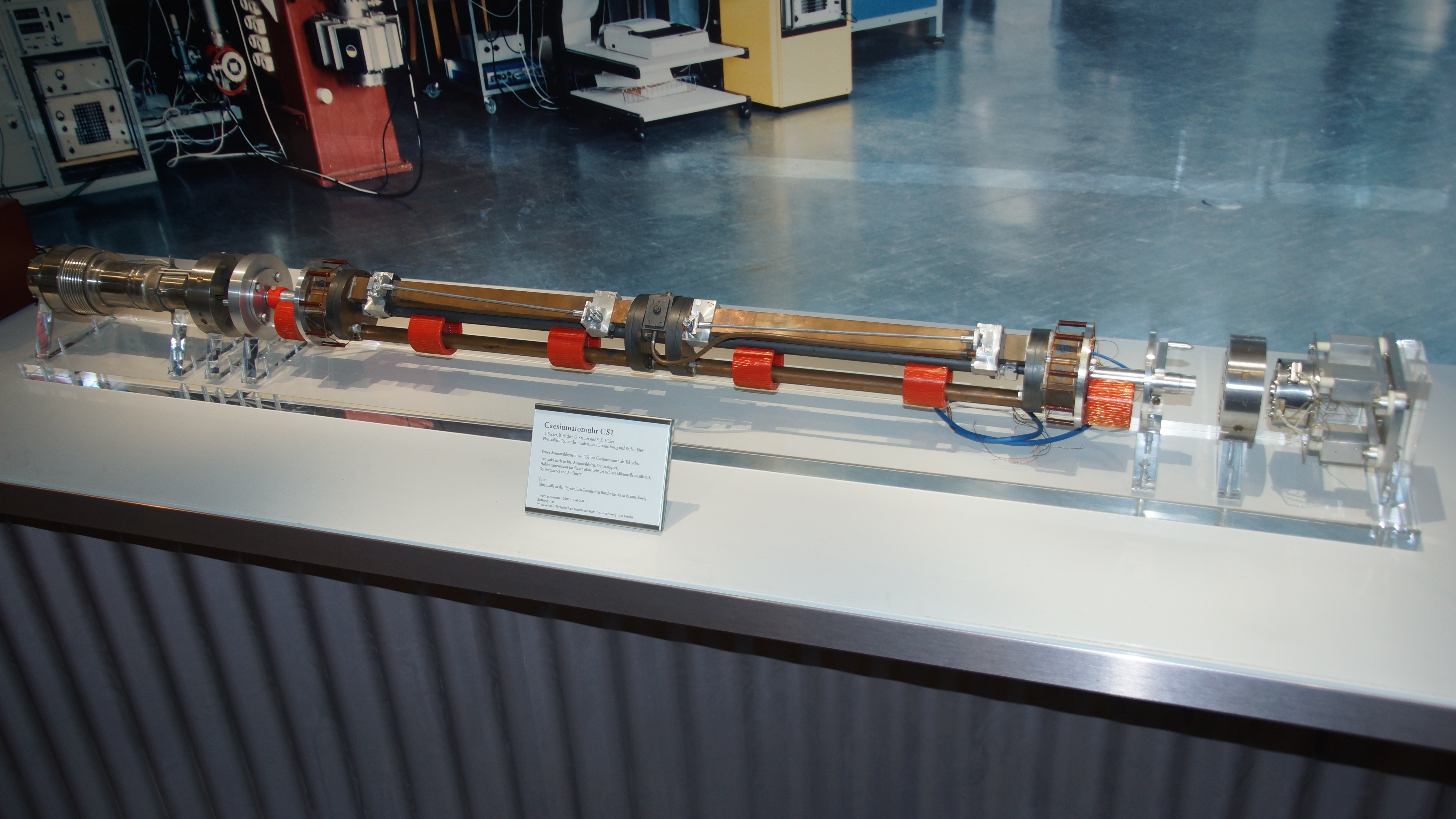 Cäsiumatomuhr CS1 im Deutschen Museum Bonn, von links nach rechts: Atomstrahlofen, Sortiermagnet, Hohlraumresonator, Sortiermagnet und Auffänger)